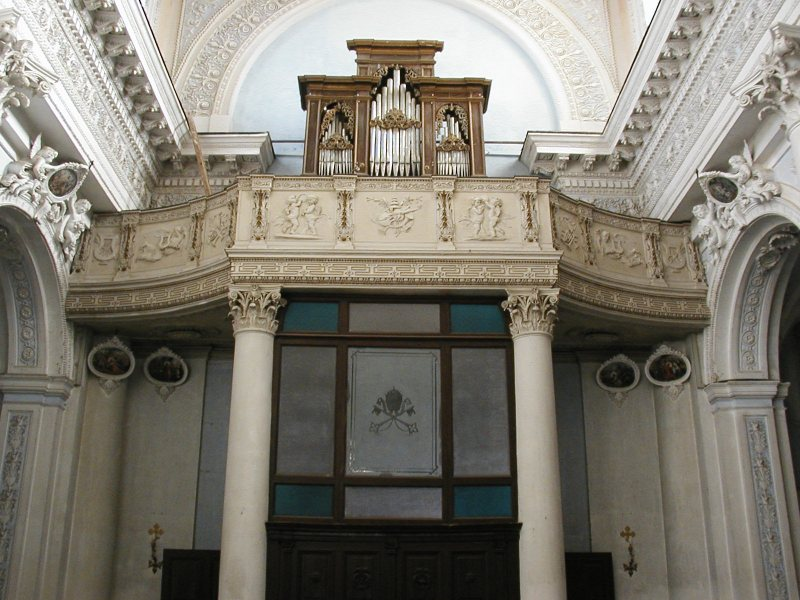 Rogliano Duomo (Foto di Luigino C.)